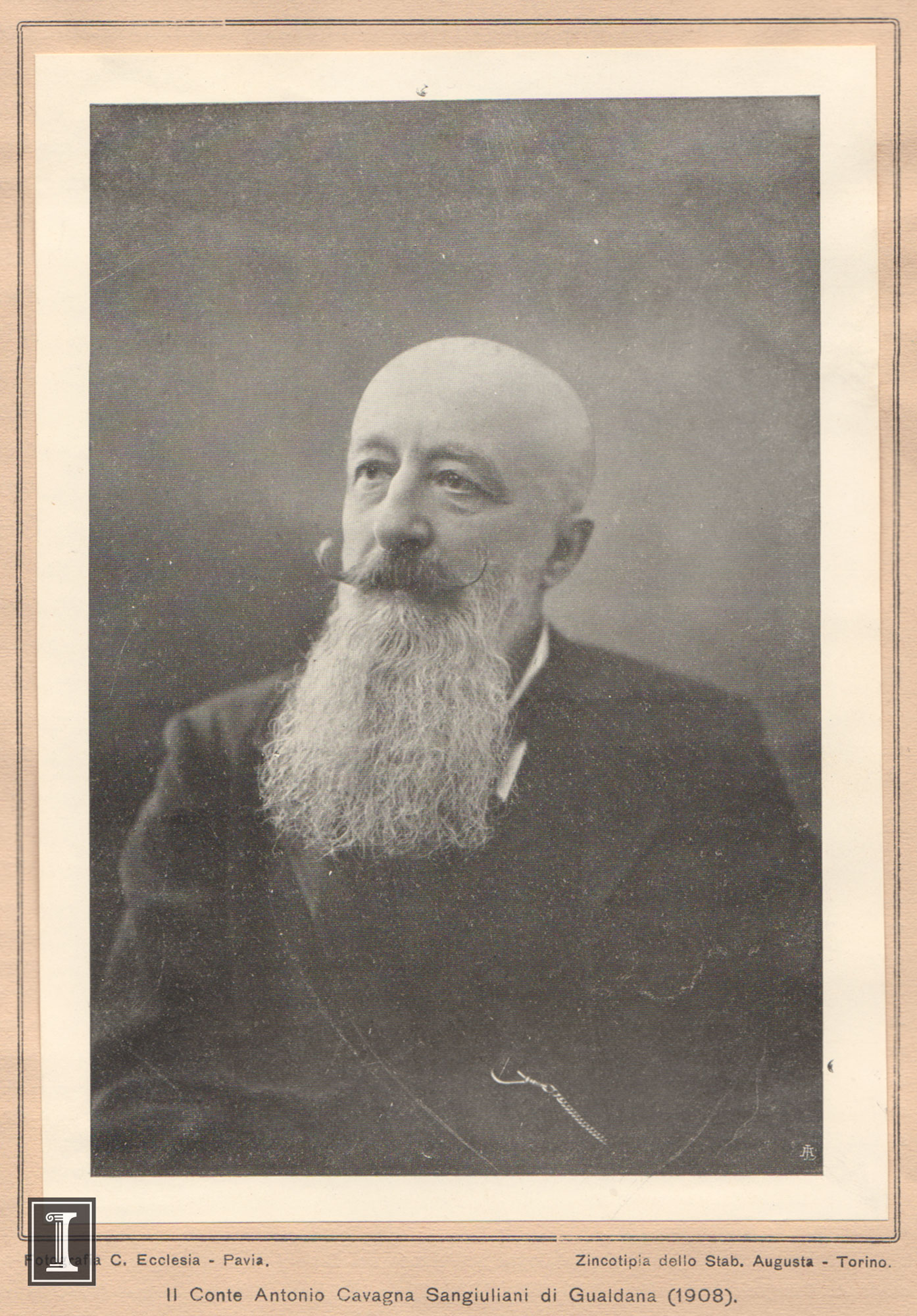 Il conte Antonio Cavagna Sangiuliani nel 1908